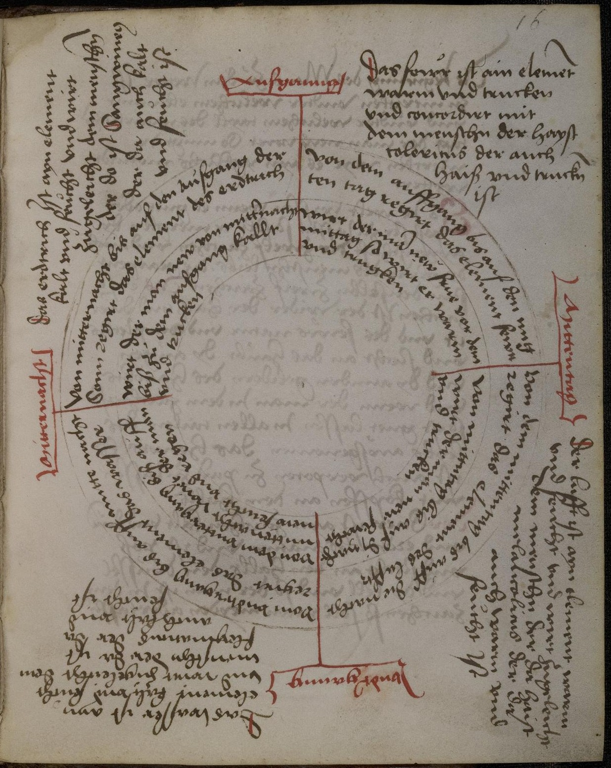 Codex Palatinus germanicus 15, Blatt 16r - Schema der vier Elemente, Temperamente, Tageszeiten